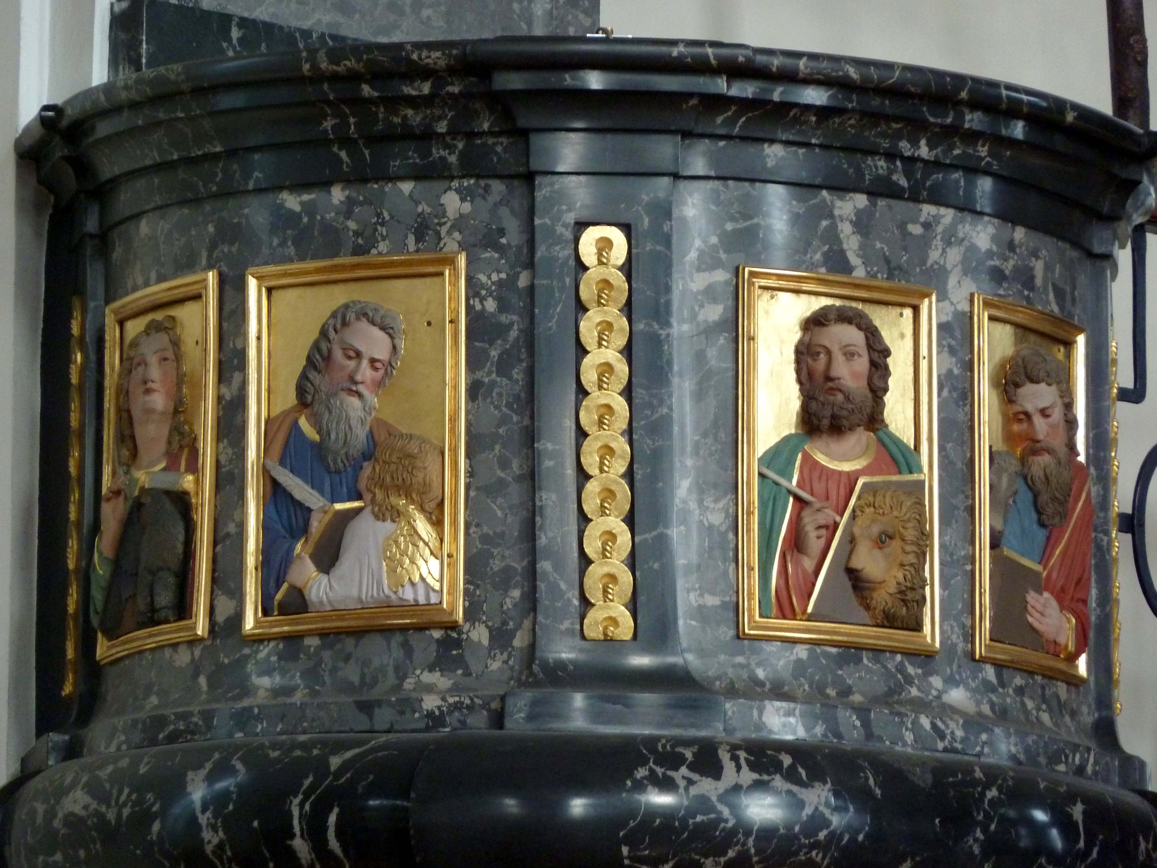 Die Kanzel mit Evangelistenreliefs in der katholischen Pfarrkirche St. Nikolaus in Altstätten, Kanton St. Gallen, Schweiz, Werk von Josef Simon Moosbrugger (1795). Die vier Evangelisten und ihre Attributen: Johannes mit Adler, Matthäus mit Buch, Markus mit Löwe, Lukas mit Ochs (v.l.n.r.).